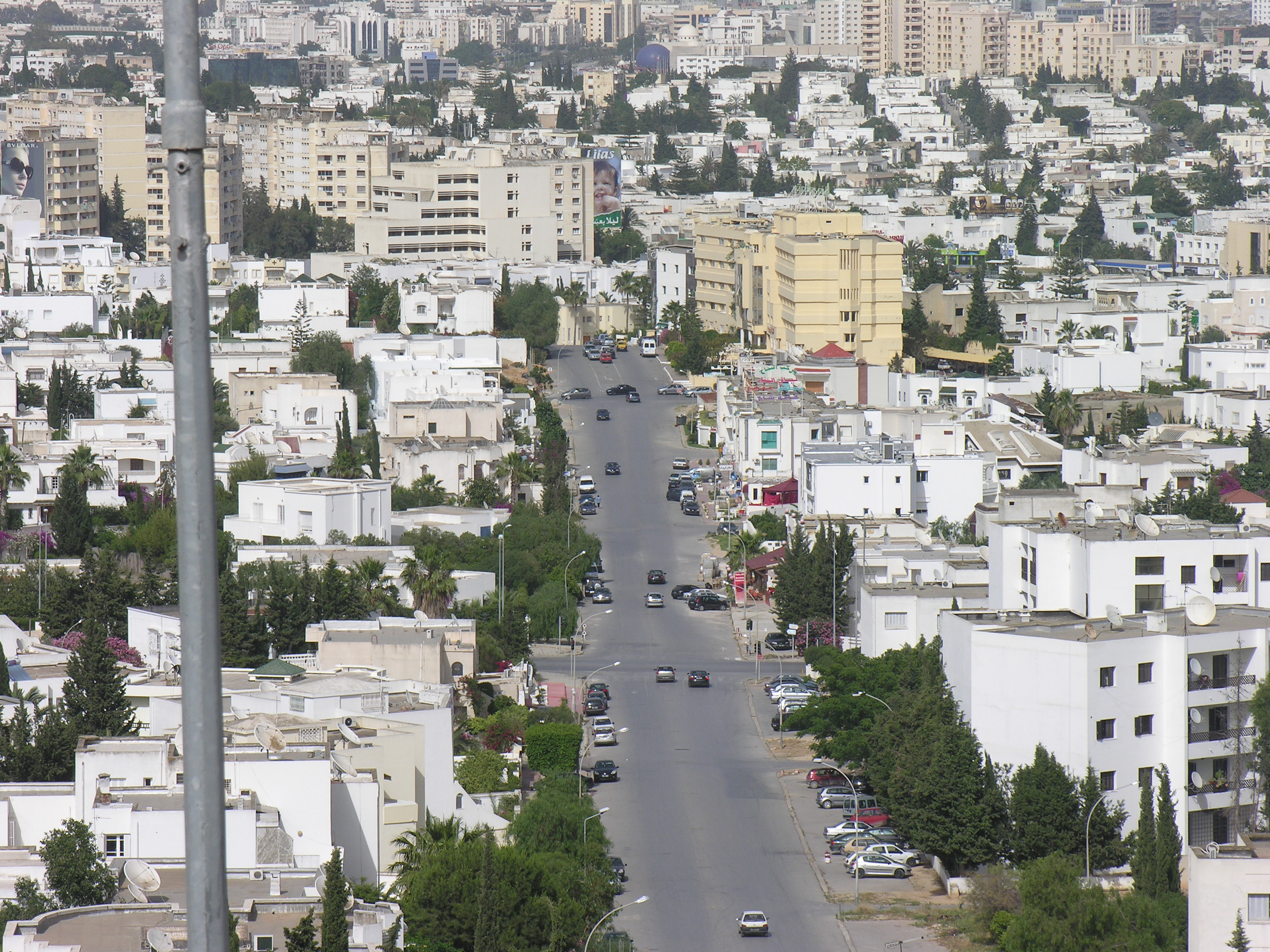 Panorama du quartier d'El Menzah 9 dans la banlieue nord de Tunis. En bas de la photo, le quartier d'El Manar.